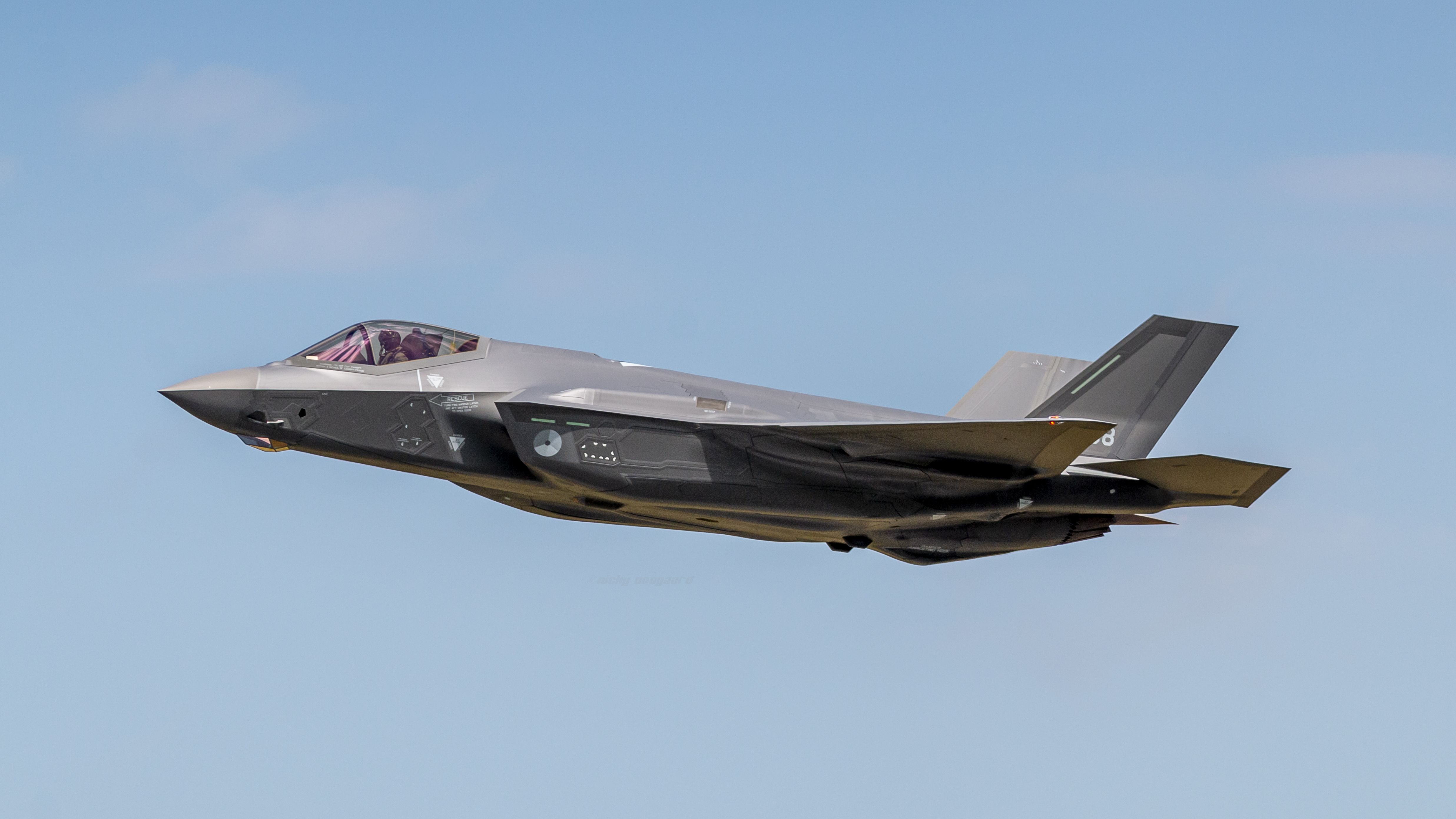 Volkel Airbase